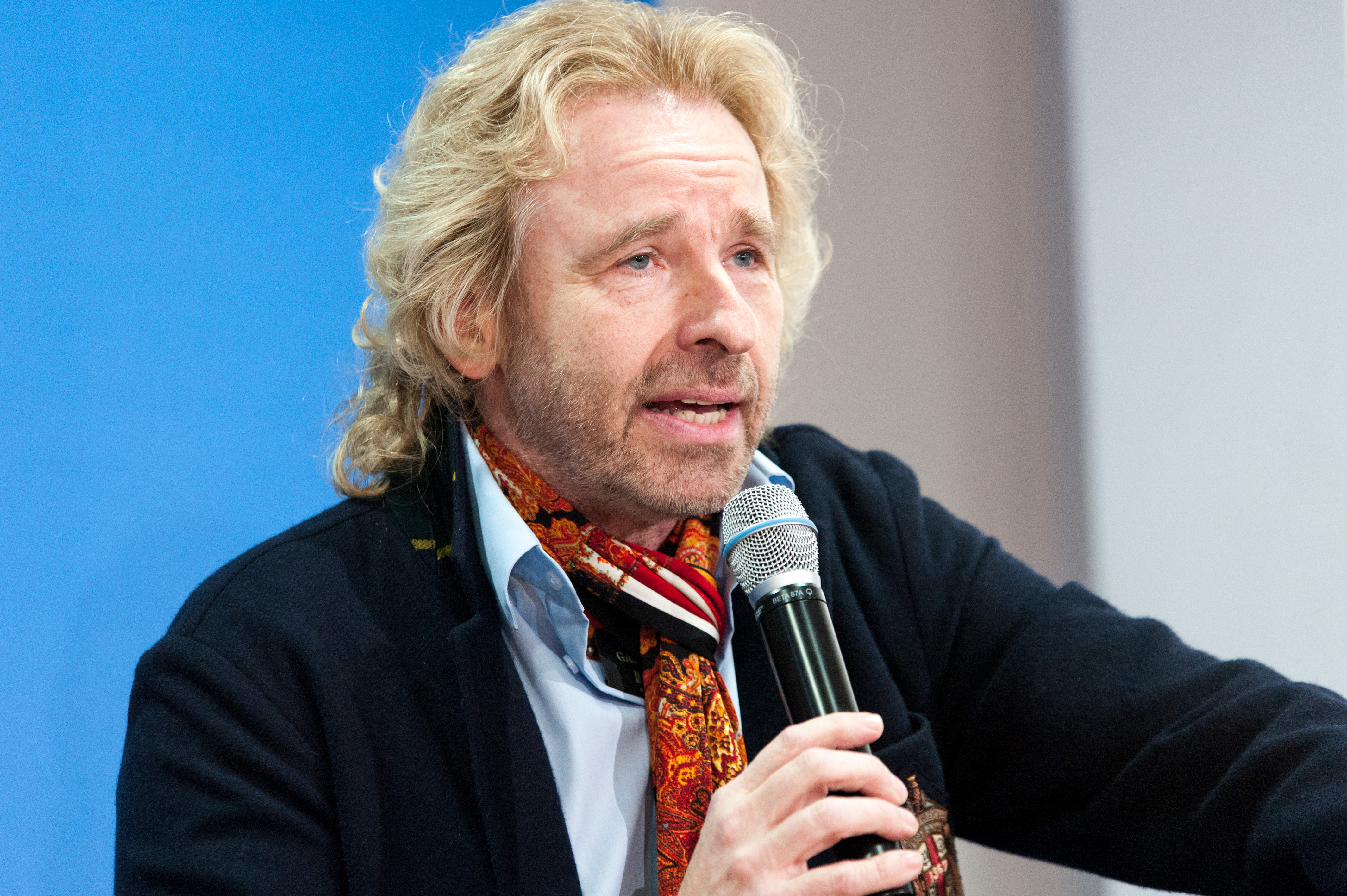 Pressekonferenz anlässlich der Vorstellung von Samuel Kochs Buch "Zwei Leben" in Berlin am 23. April 2012.